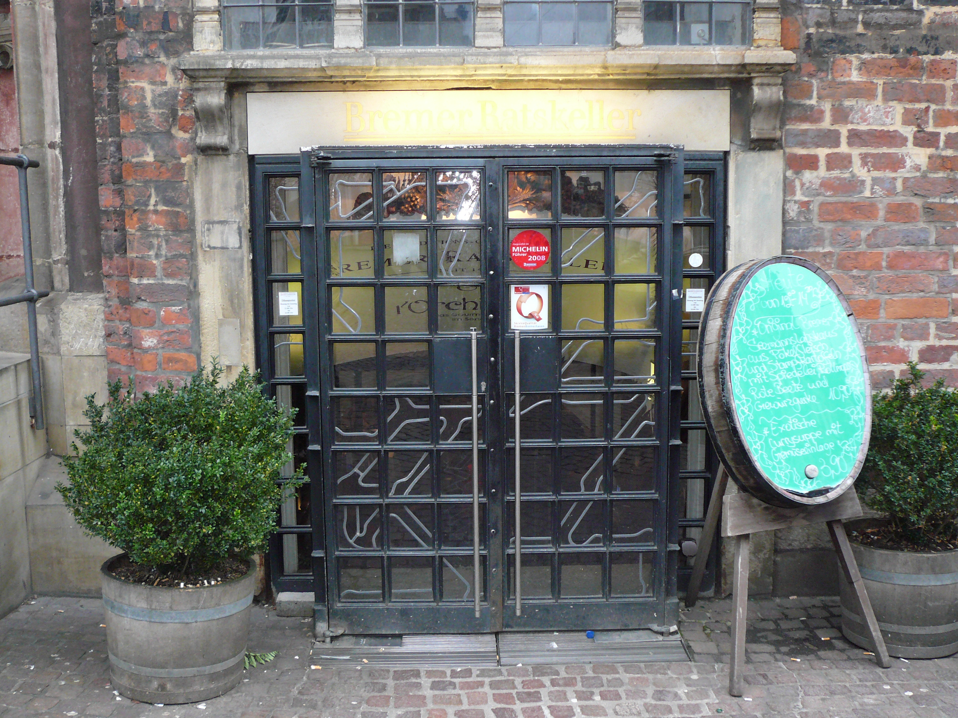 Der Eingang zum Bremer Ratskeller.